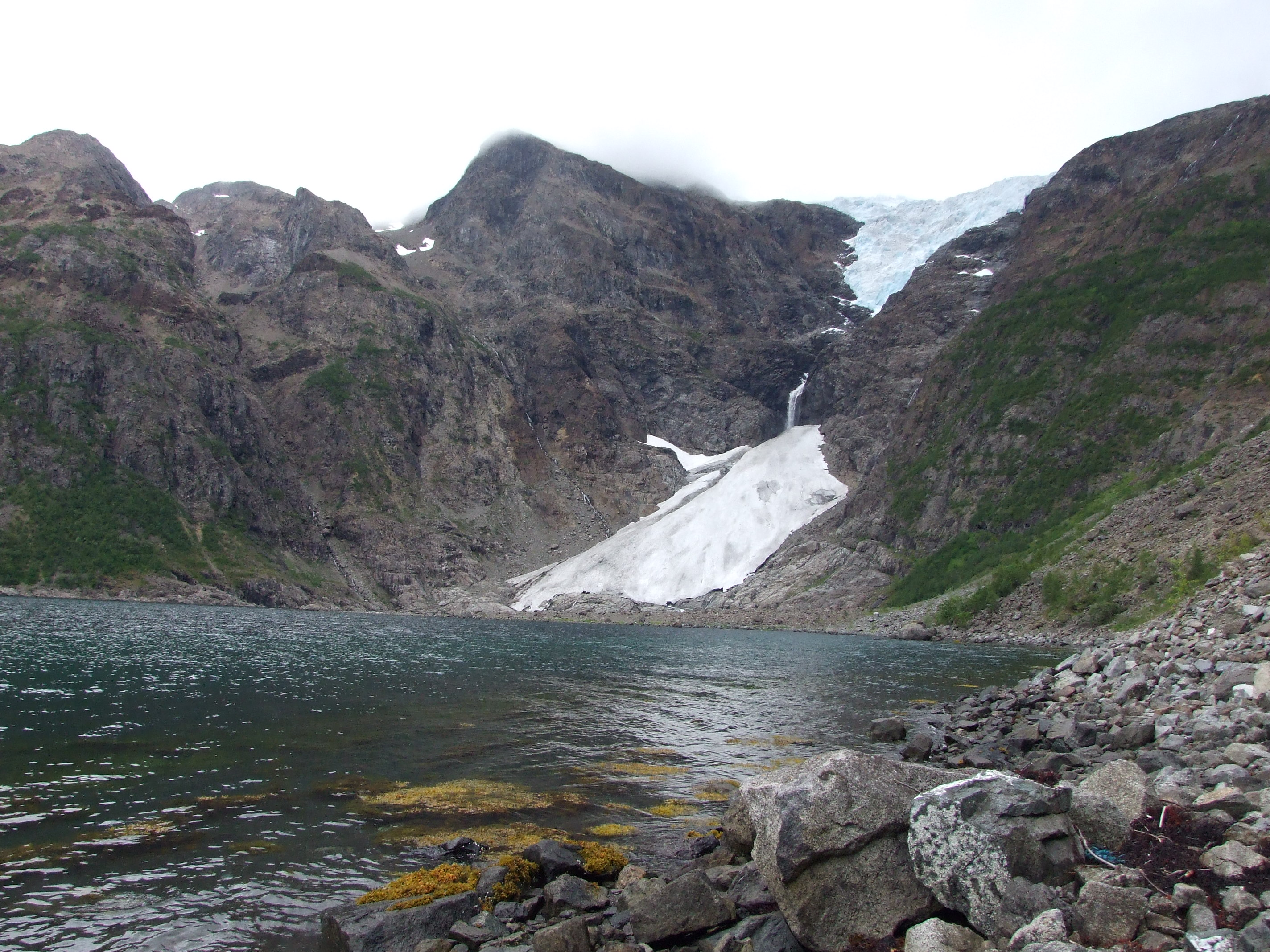 Blick auf den Øksfjordjøkelen